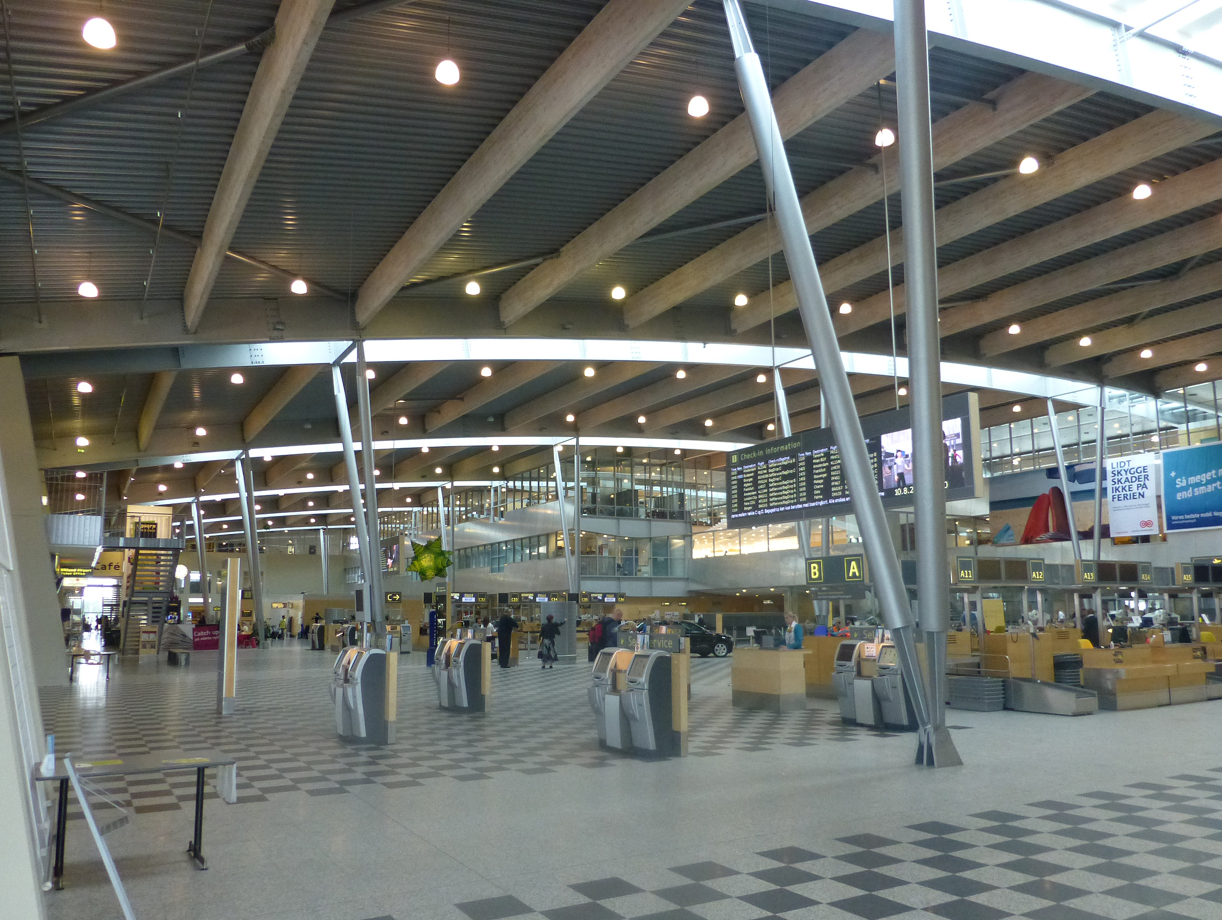 Billund Airport afgangshallen